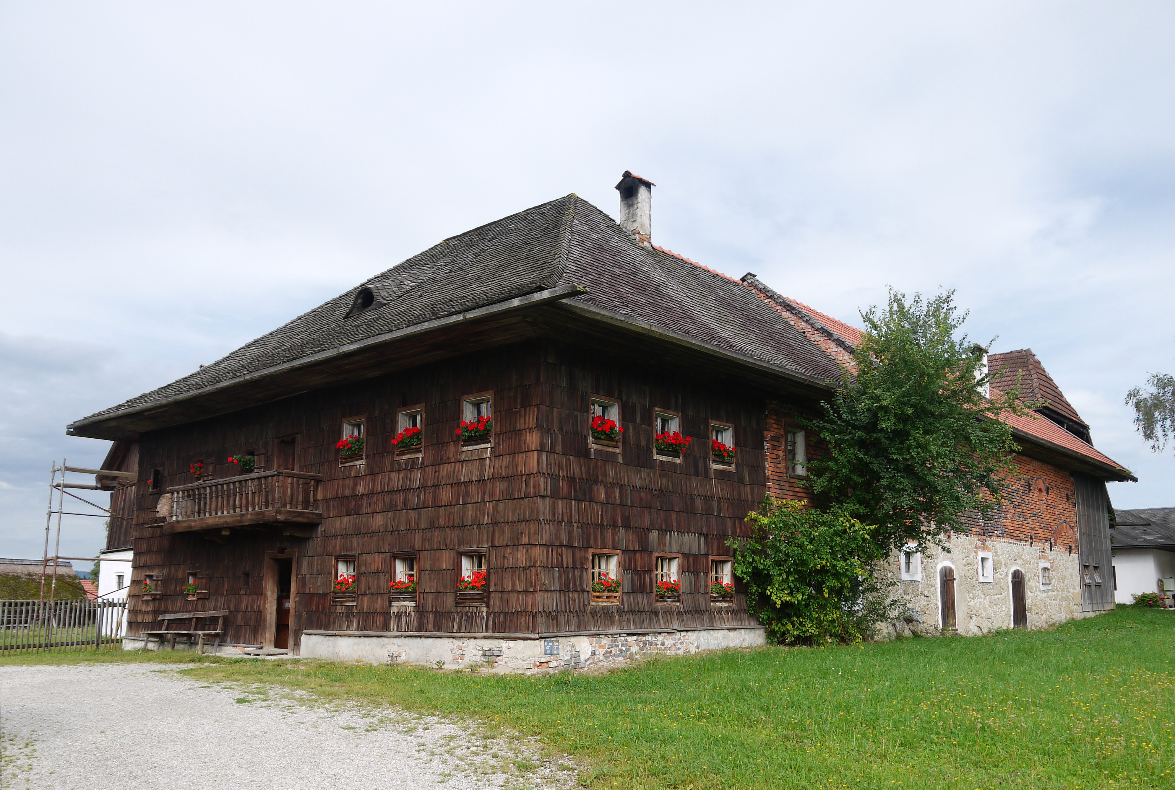 Bauernhaus, Stehrerhof